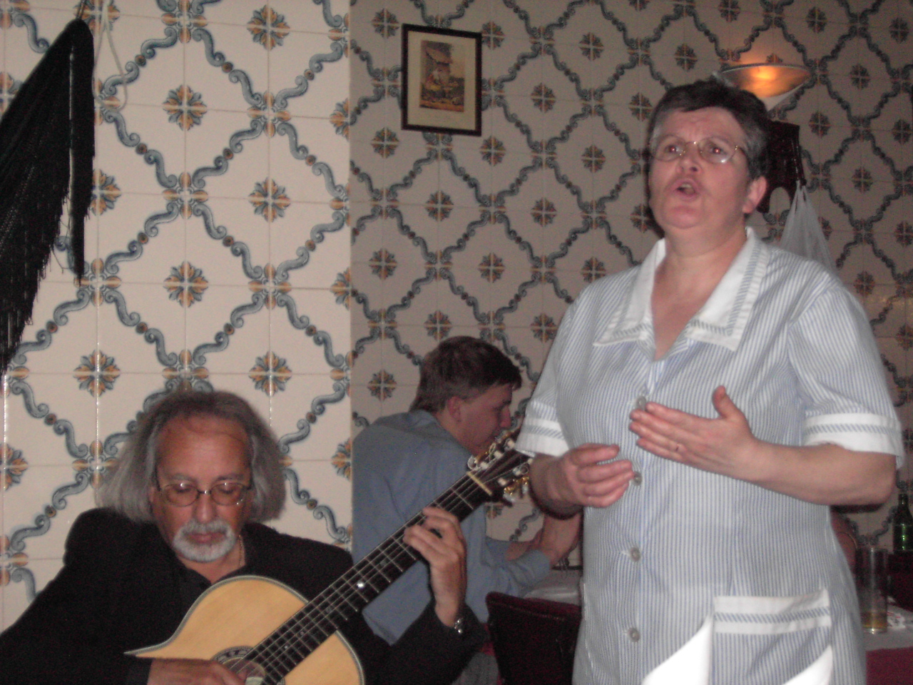 2005, Lisboa, Adega do Ribatejo - Maria, cuoca e fadista